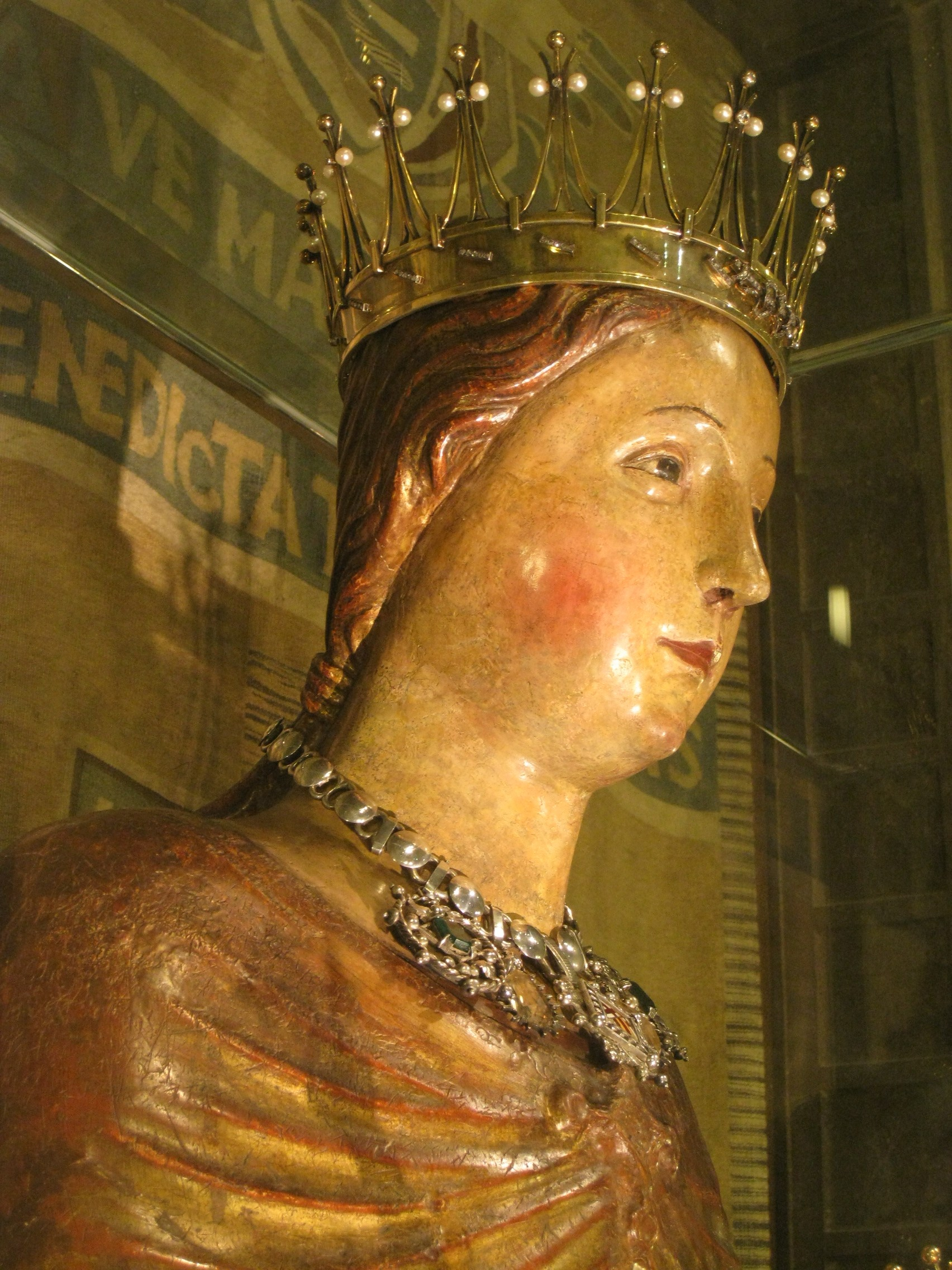 La Mare de Déu de la Mercè, talla gòtica del 1361 atribuïda a Pere Moragues, dins la basílica de la Mercè (Barcelona)